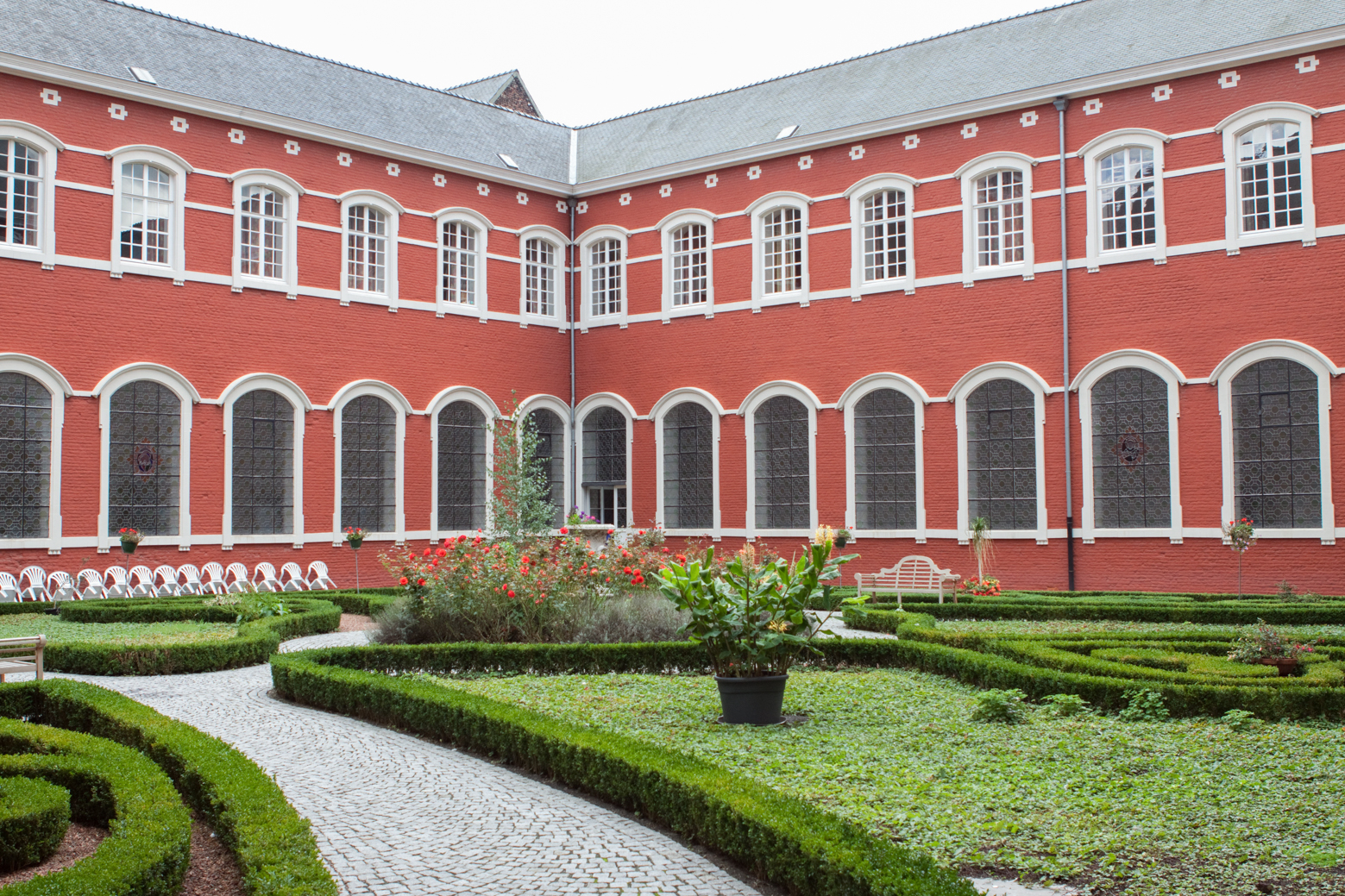 Augustijnenklooster